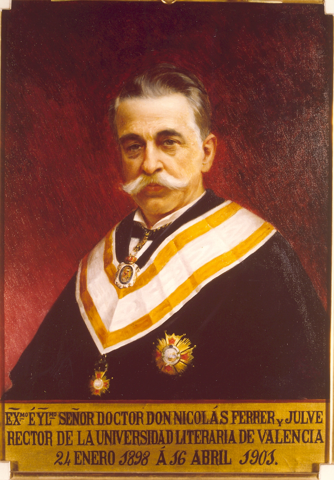 Retrato del Rector Nicolás Ferrer y Julve, por Julio Cebrián Mezquita (1854-1926). Primer presidente del ADR de la Facultad de Derecho.